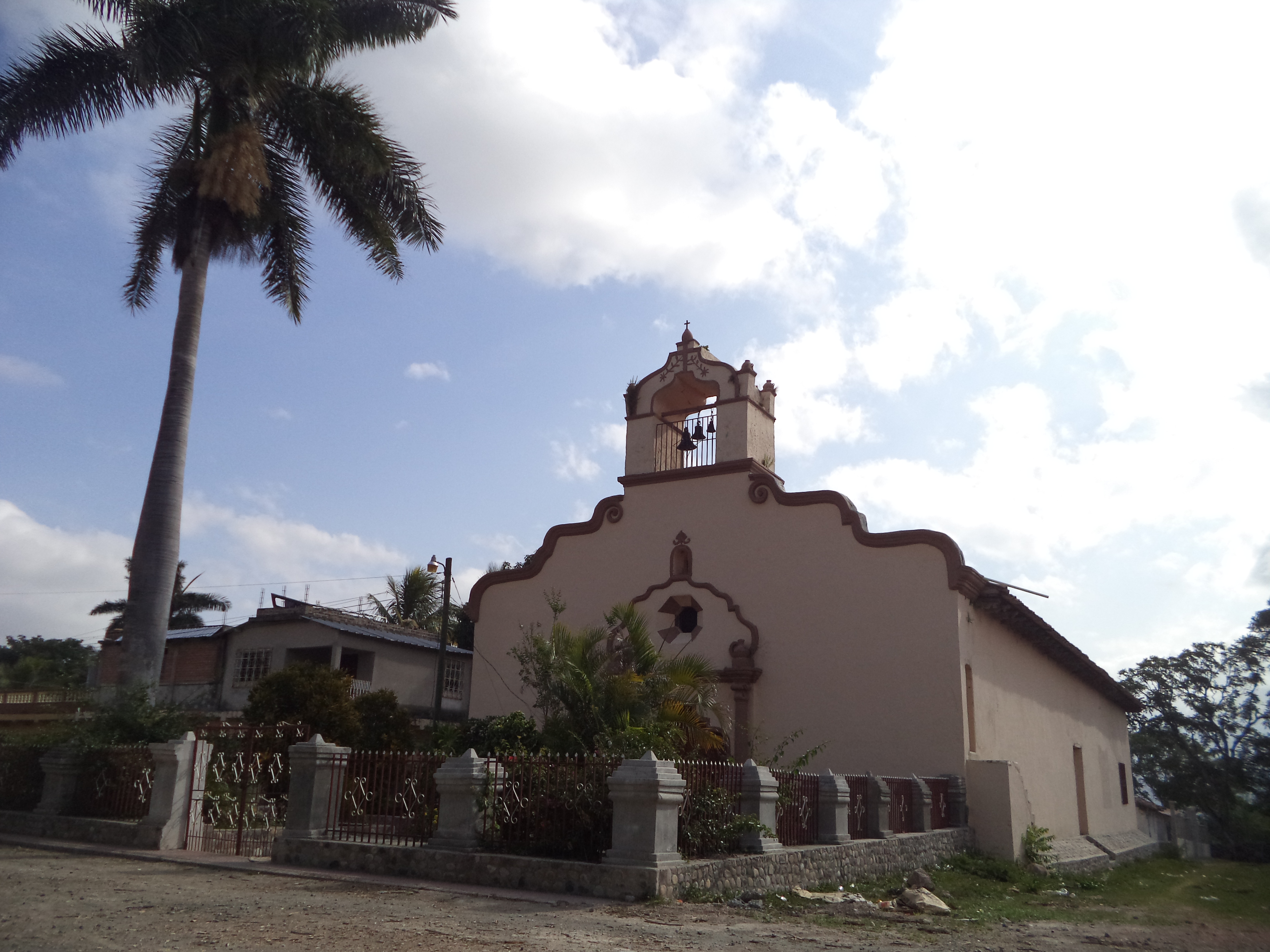 La iglesia fue construida durante la colonización de Honduras